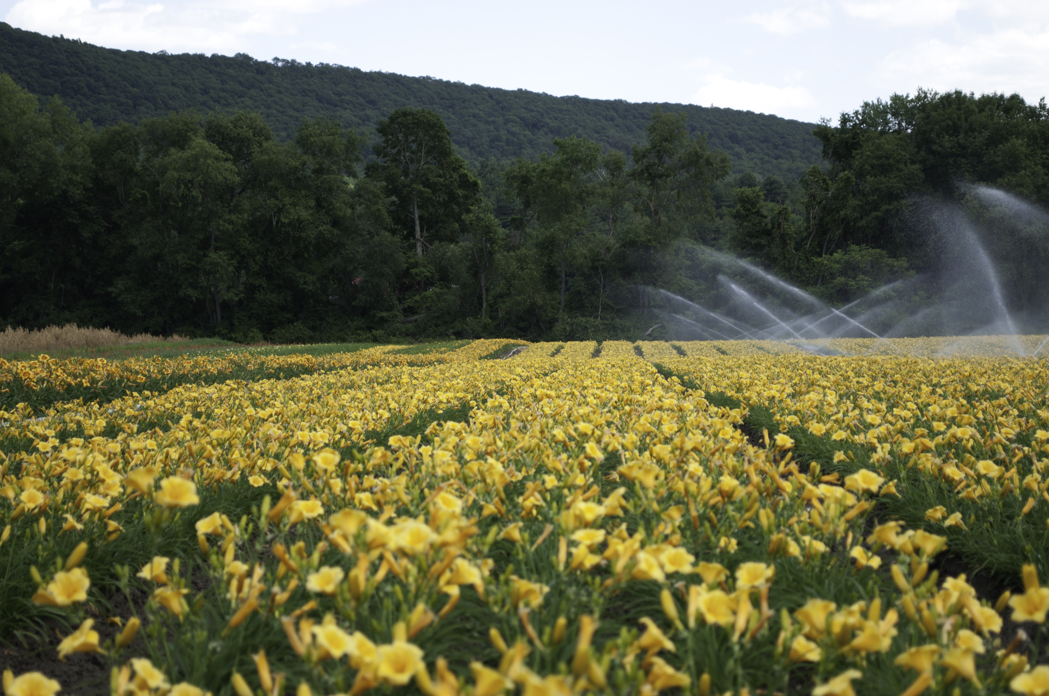 Flower Farm, Deerfield, Massachusetts